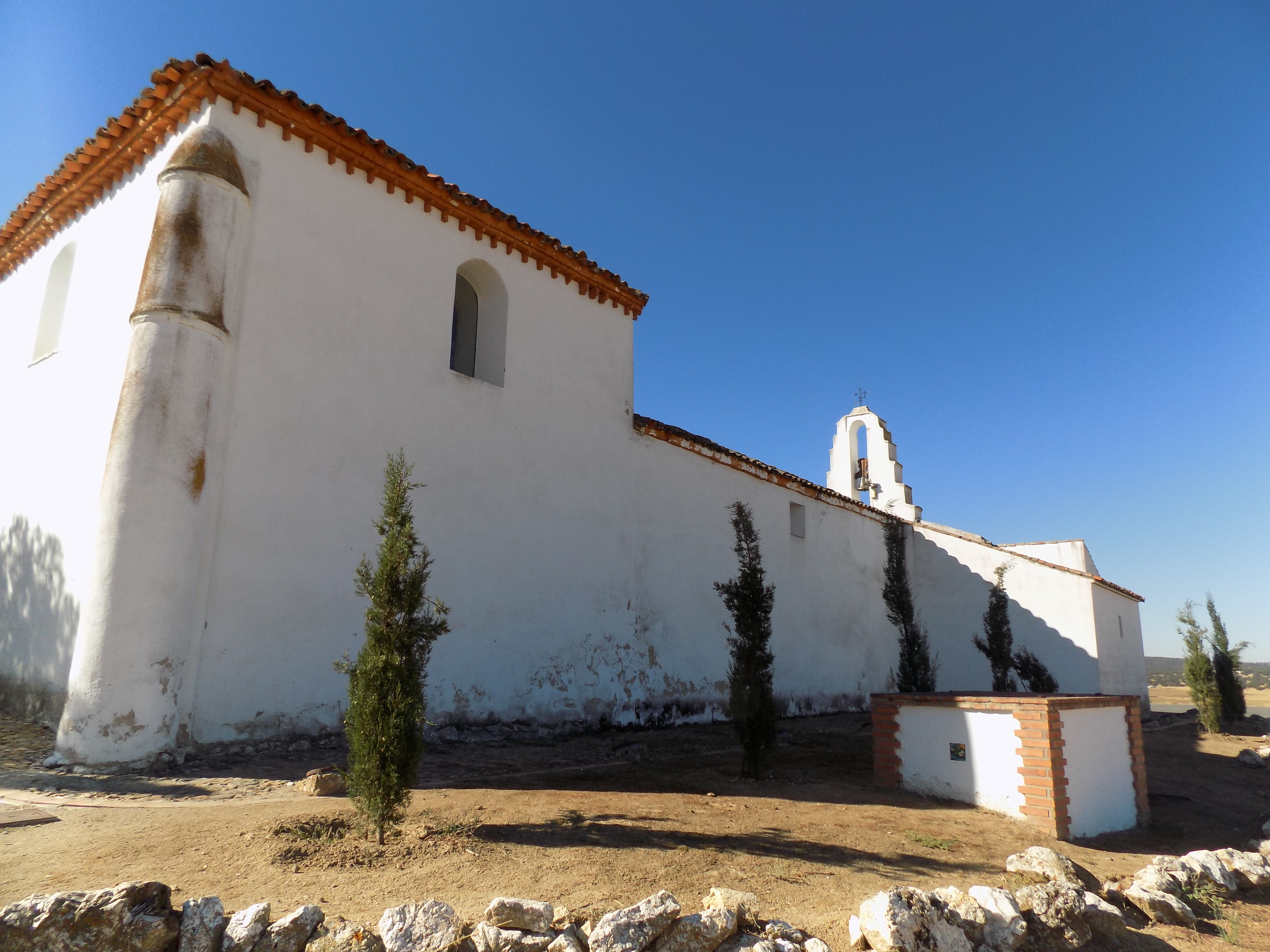 Exterior de la Ermita de Nuestra Señora de Gracia de Fuente Obejuna, en la provincia de Córdoba, (España).